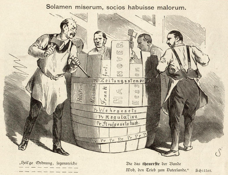 Bismarck-Album des Kladderadatsch. "Solamen miserum, socios habuisse malorum." Karikatur auf Bismarck, der mit den preußischen Gesetzen die neu eroberten Staaten wie Hannover verbindet.